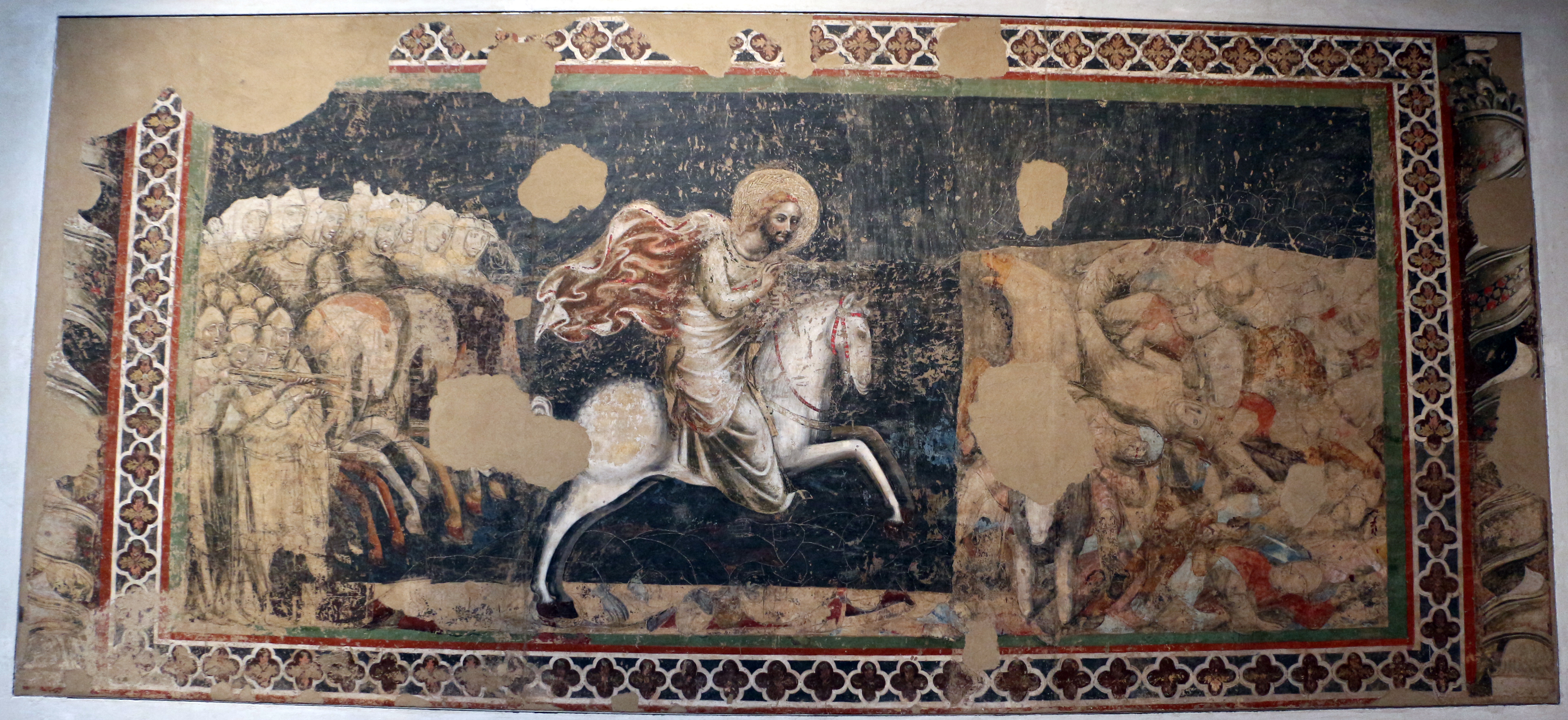 Pinacoteca Nazionale di Bologna This is a photo of a monument which is part of cultural heritage of Italy.